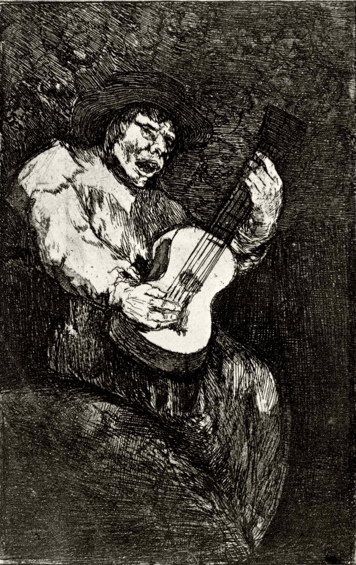 El_cantor_ciego (grabado)